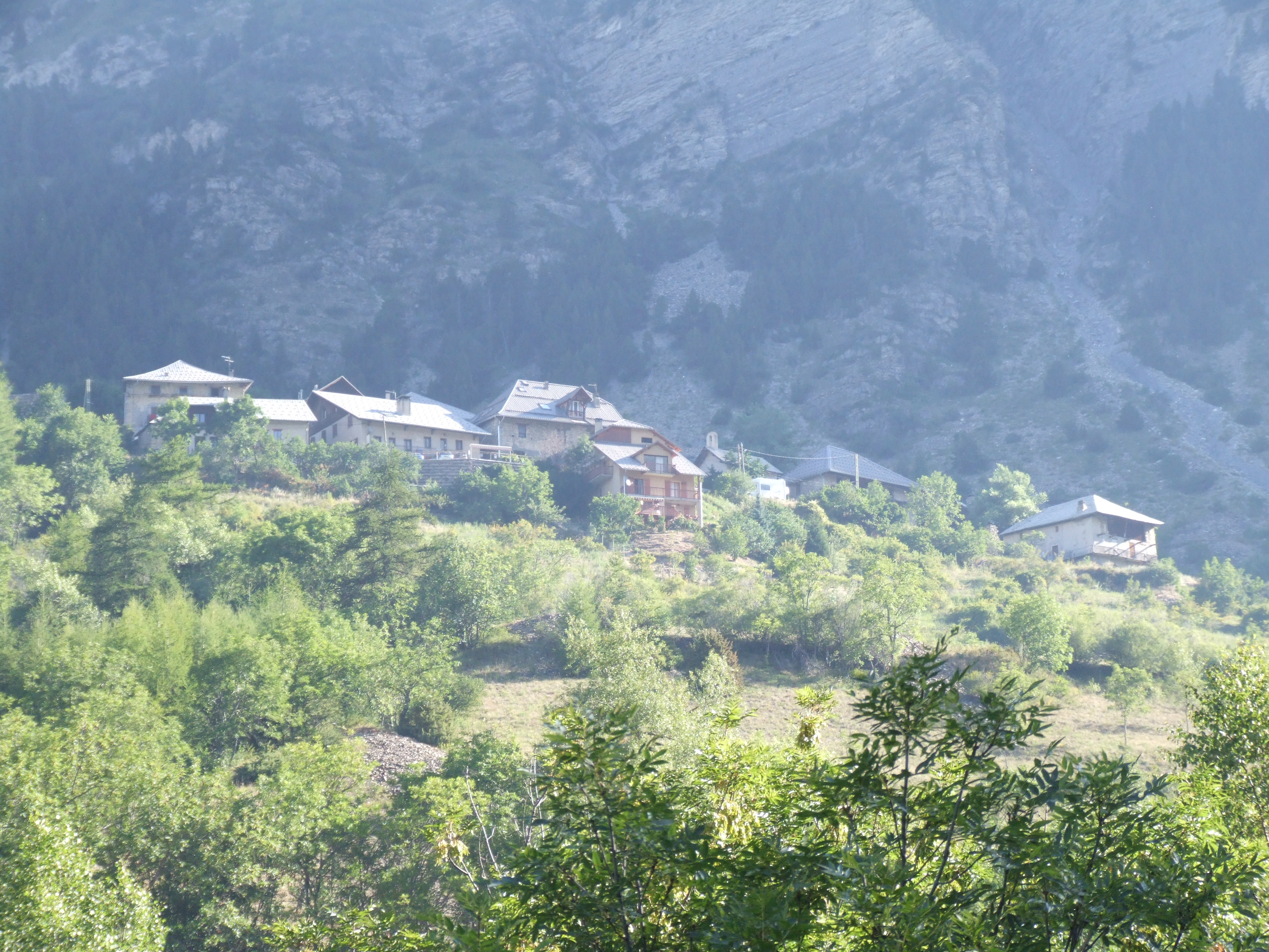 Vue du hameau du Château de la commune des Orres (Hautes-Alpes ; France)